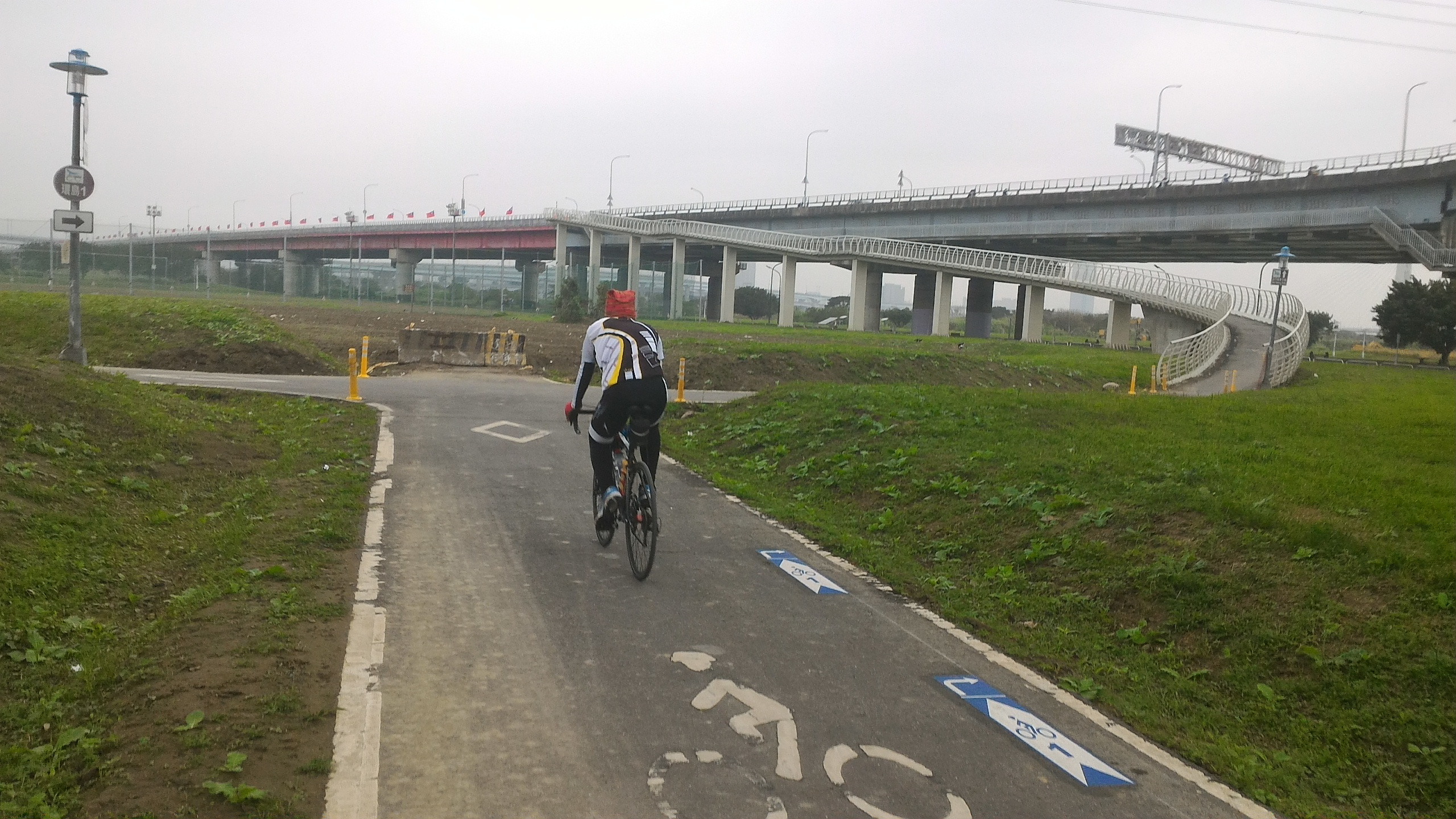 Bân-lâm-gú: 環島1號線上華江橋前